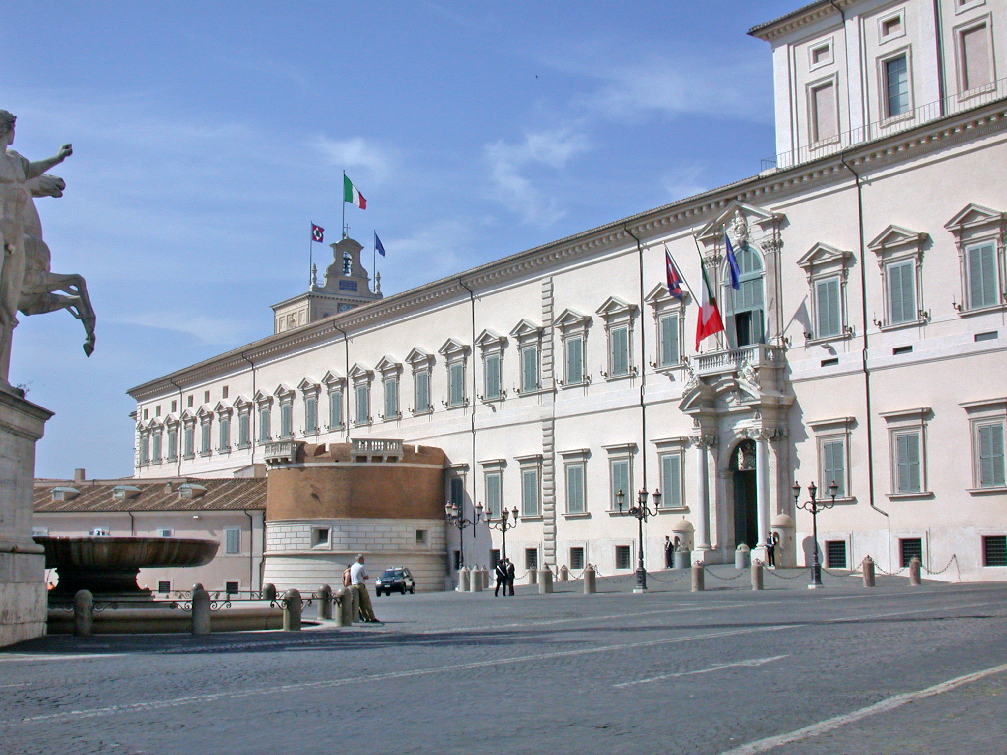 Palazzo del Quirinale, Roma, facciata su piazza del Quirinale. Foto personale (maggio 2005) by MM in it.wiki